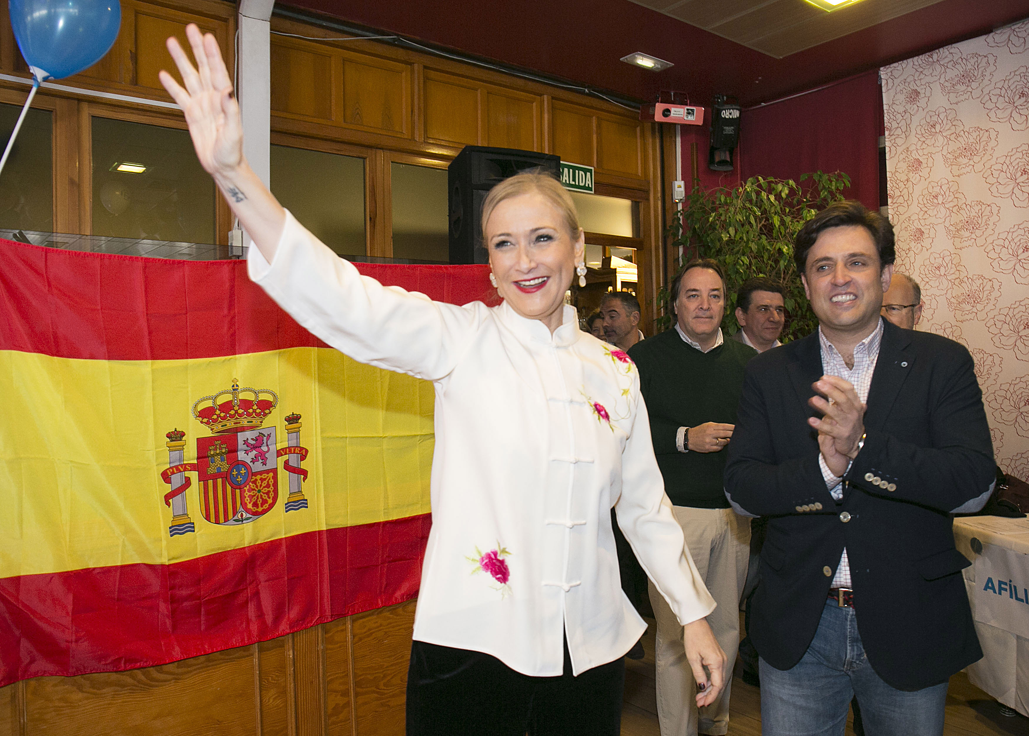 Seguimos celebrando la #NavidadPPMadrid por todos los puntos de la región. En Galapagar la izquierda también dejó un municipio casi en quiebra y han sido las políticas del Partido Popular las que han reducido la deuda, creando infraestructuras y haciendo políticas sociales. Estamos creando empleo: 333 personas cada día encuentran un trabajo en la Comunidad de Madrid y no pararé de trabajar ni un solo día hasta que todos los madrileños tengan un trabajo. Gracias a Daniel Pérez y a todos los afiliados del Partido Popular de Galapagar por vuestro cariño.